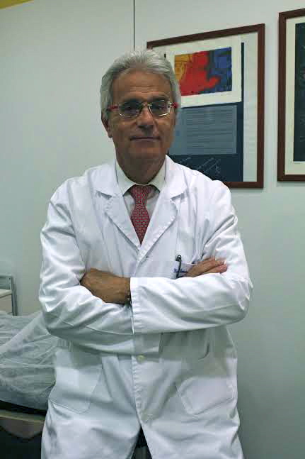 Dr. Ramón Cugat en su despacho Barcelona 2014